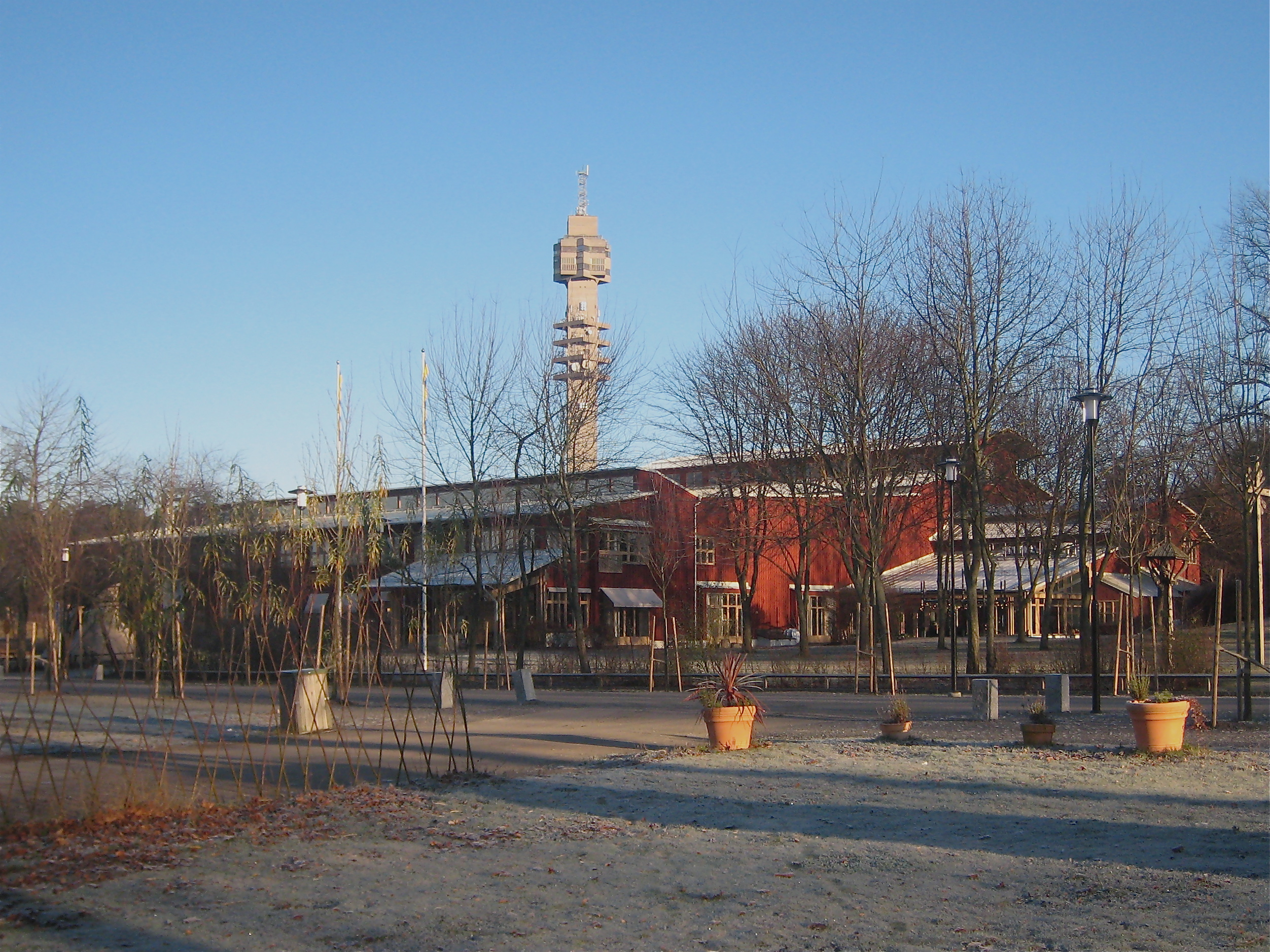 Etnografiska museet i Stockholm